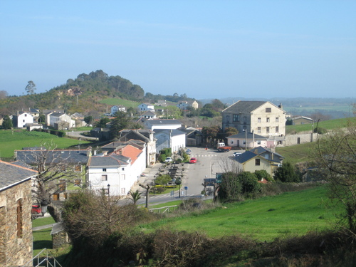 Plaza de la Roda